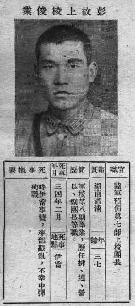 中文（台灣）: 抗戰軍人忠烈錄第一輯中的烈士遺像